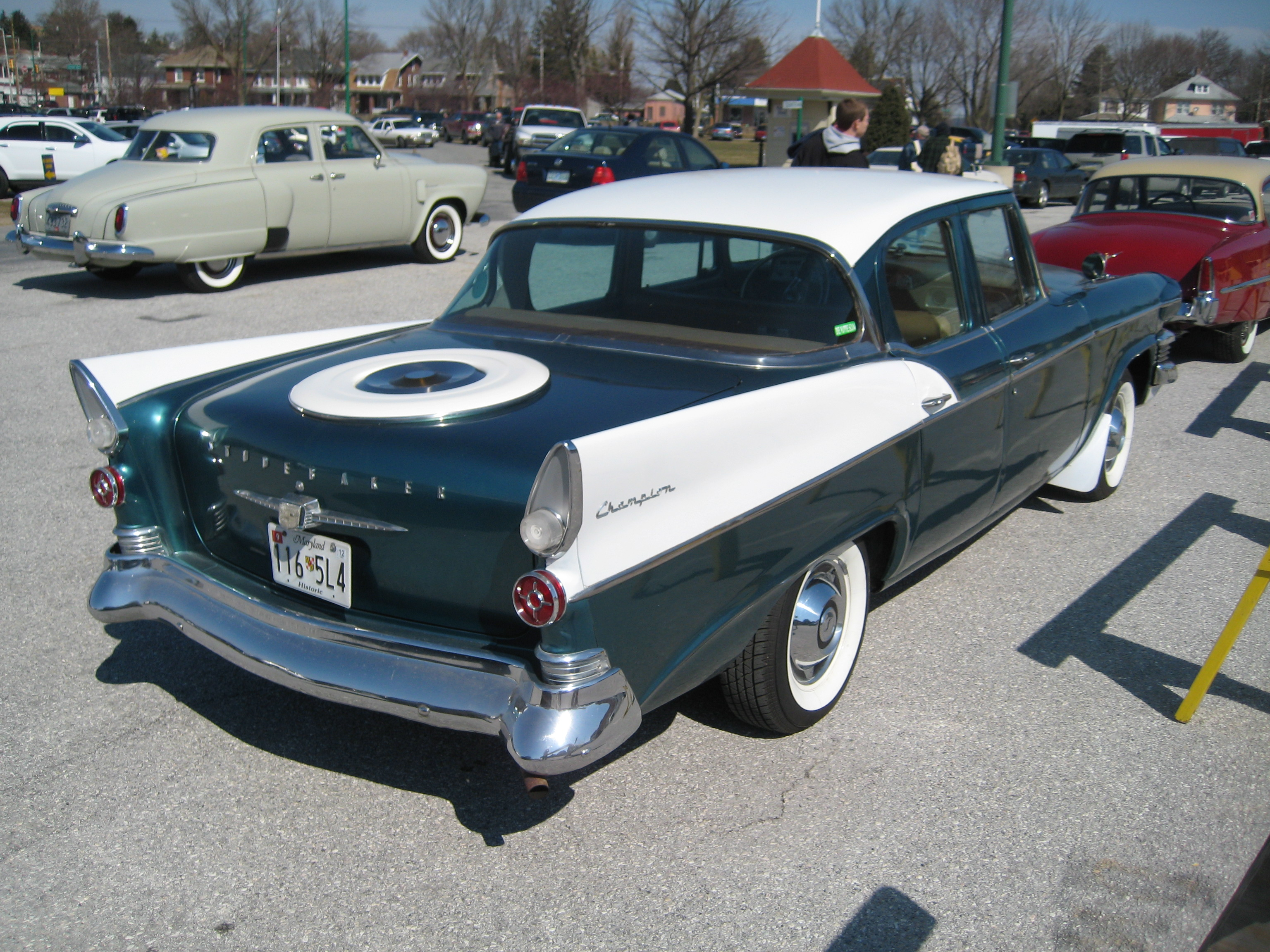 1958 Studebaker Champion 4-door sedan